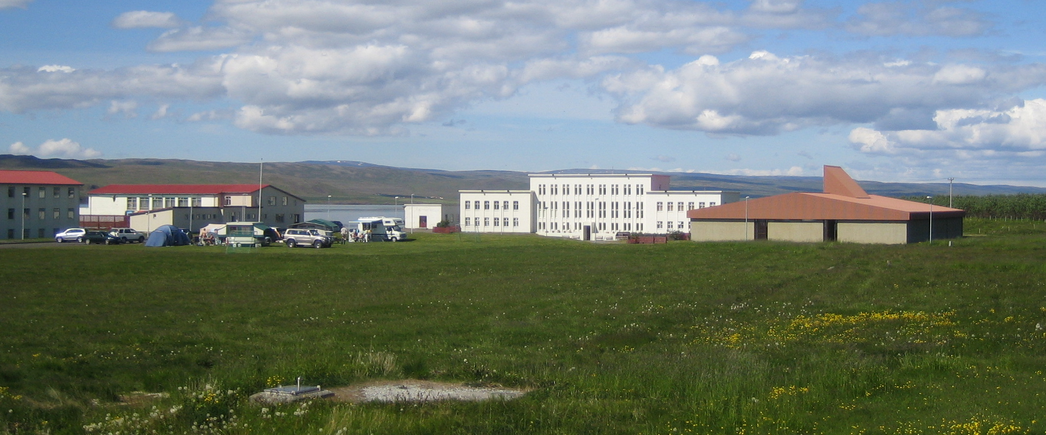 Reykjaskóli í Hrútafirði